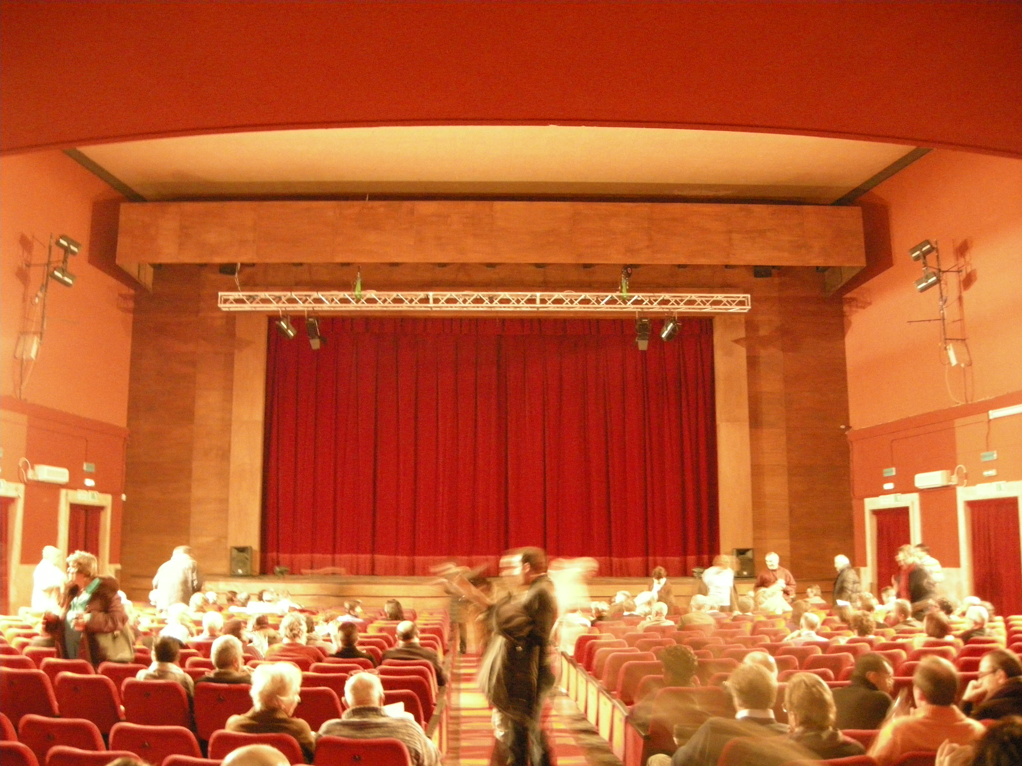 Teatro puccini, interno 01